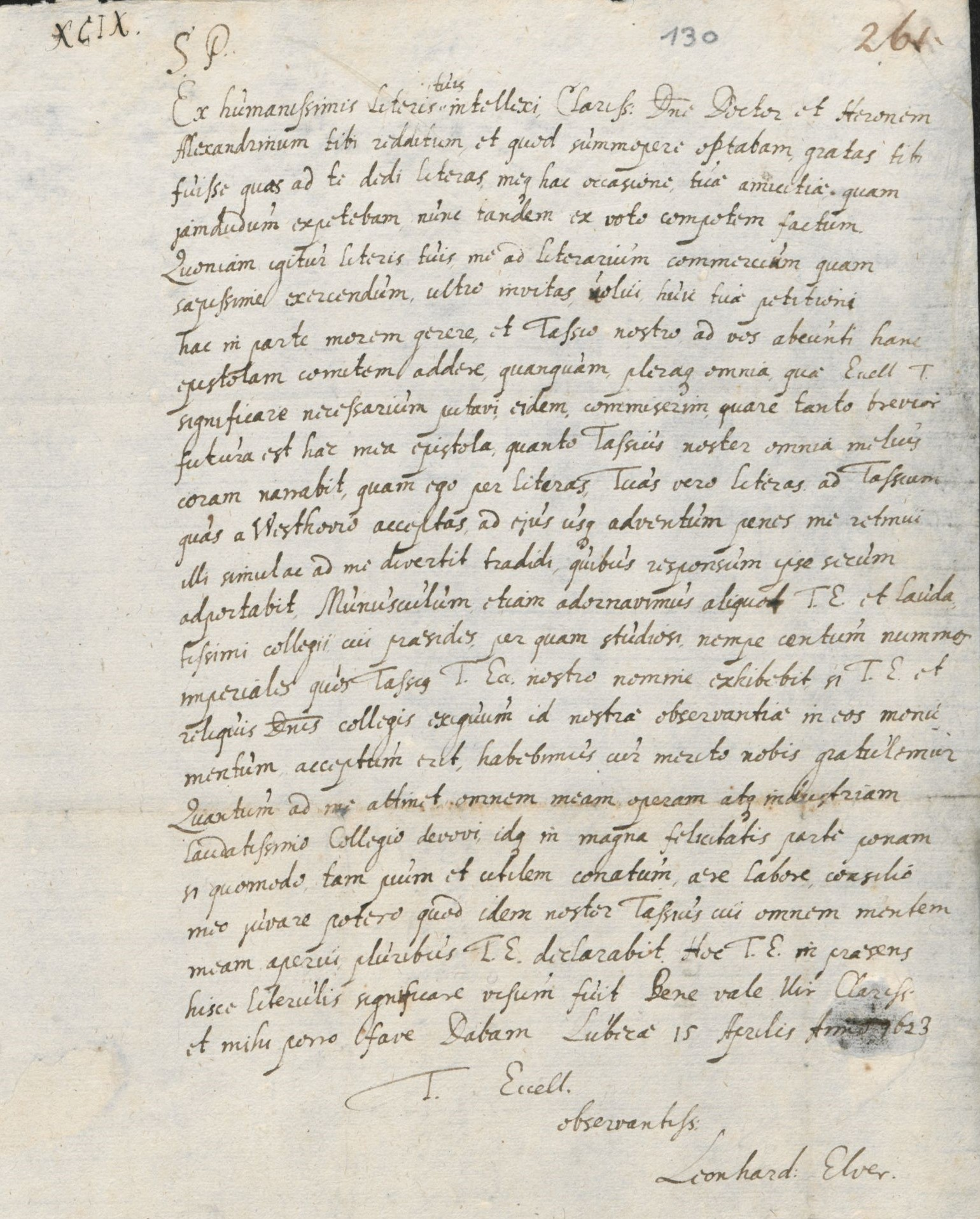 Brief von Leonard Elver an Joachim Jungius, NL Jungius, Hamburg, Sup: ep; 97, f. 130